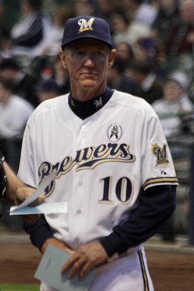 Ron Roenicke